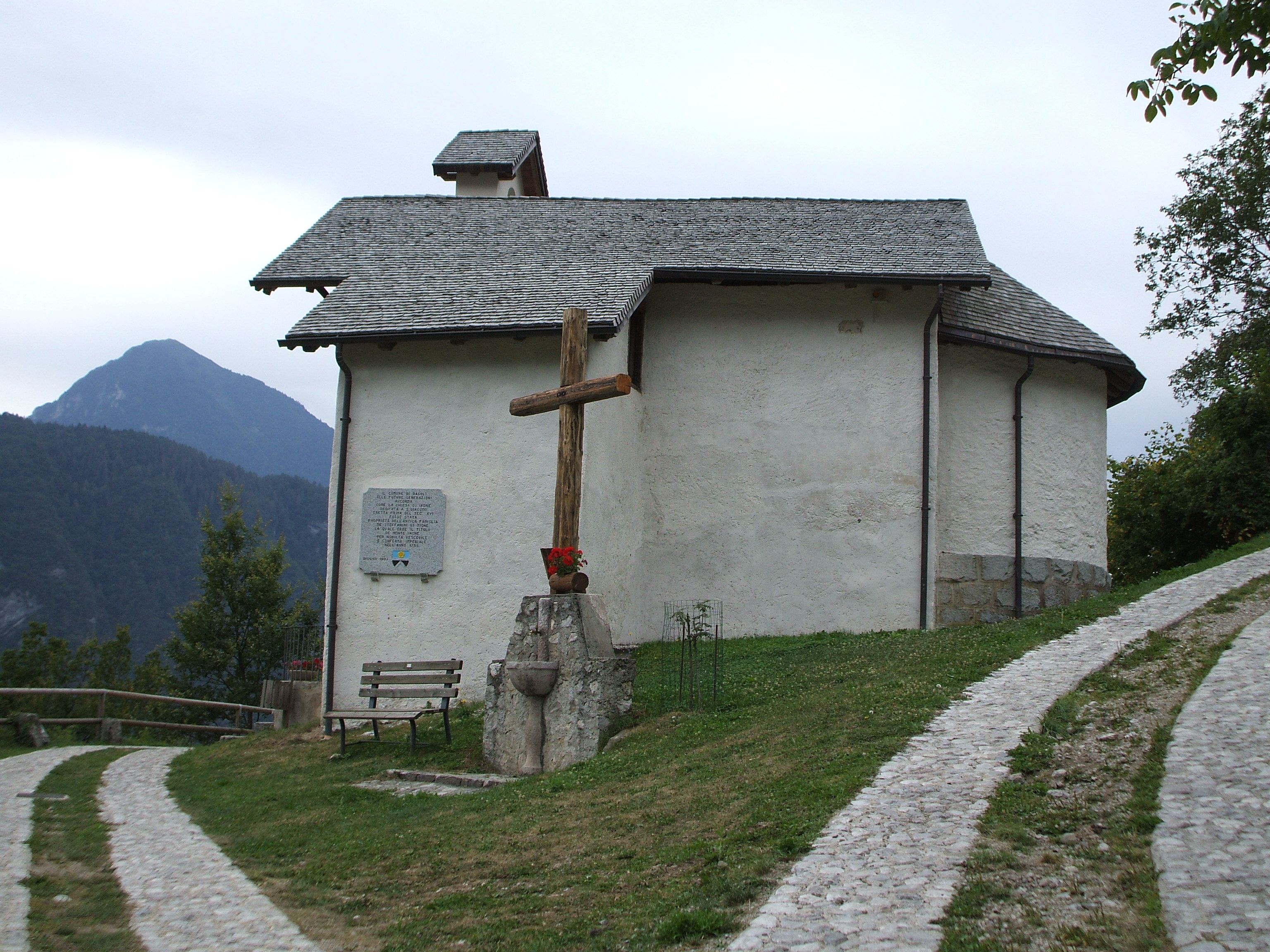 Chiesetta di Irone